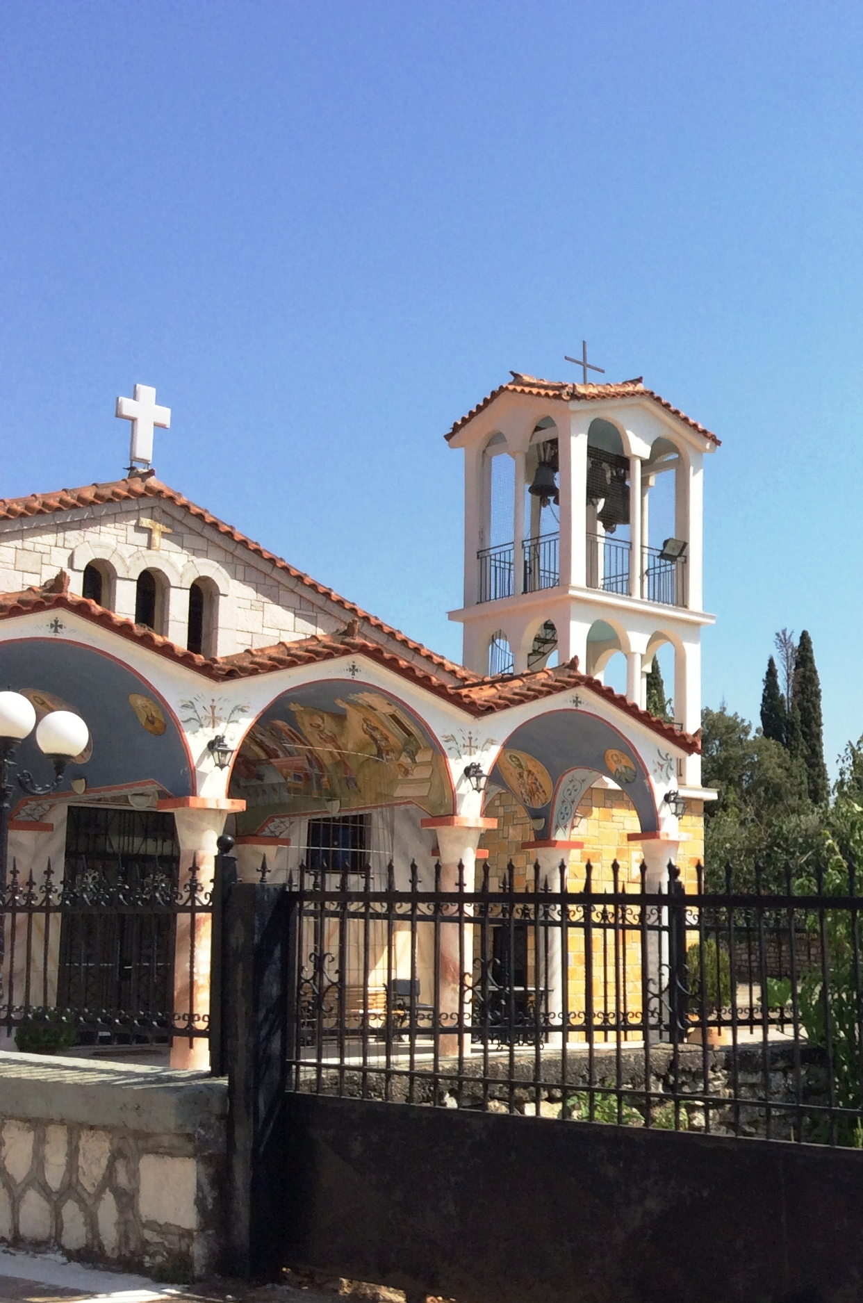 Κοπανάκι Μεσσηνίας. Ο Ιερός Ναός του Τιμίου Προδρόμου Κάτω Κοπανακίου.